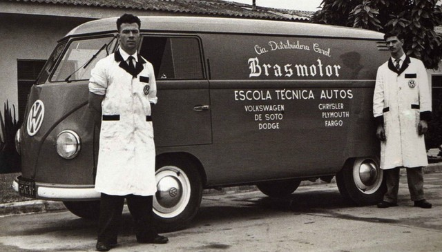 Escola Tecnica Brasmotor